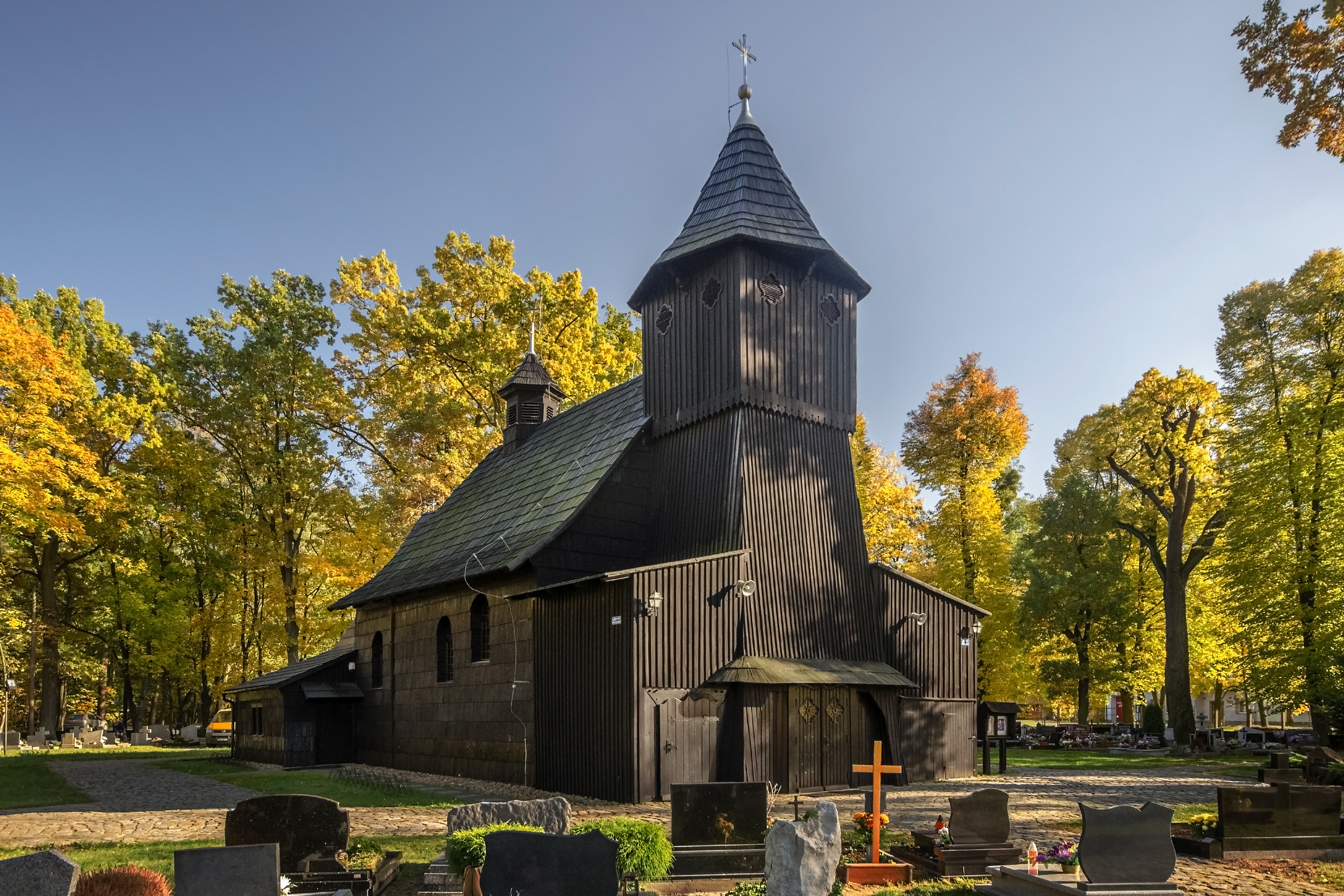 Stare Olesno, kościół par. pw. św. Marii Magdaleny, 1860